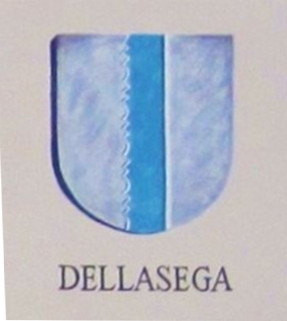 Cognomi storici dei Vicini che discendono dalle famiglie della Regola che abitavano a Predazzo e riguardano 19 cognomi: Boninsegna, Bonora, Bosin, Brigadoi, Defrancesco, Degaudenz, Dellagiacoma, Dellantonio, Dellasega, Demartin, Dezulian, Felicetti, Gabrielli, Giacomelli, Guadagnini, Morandini, Nicolao, Piazzi e Zanna.